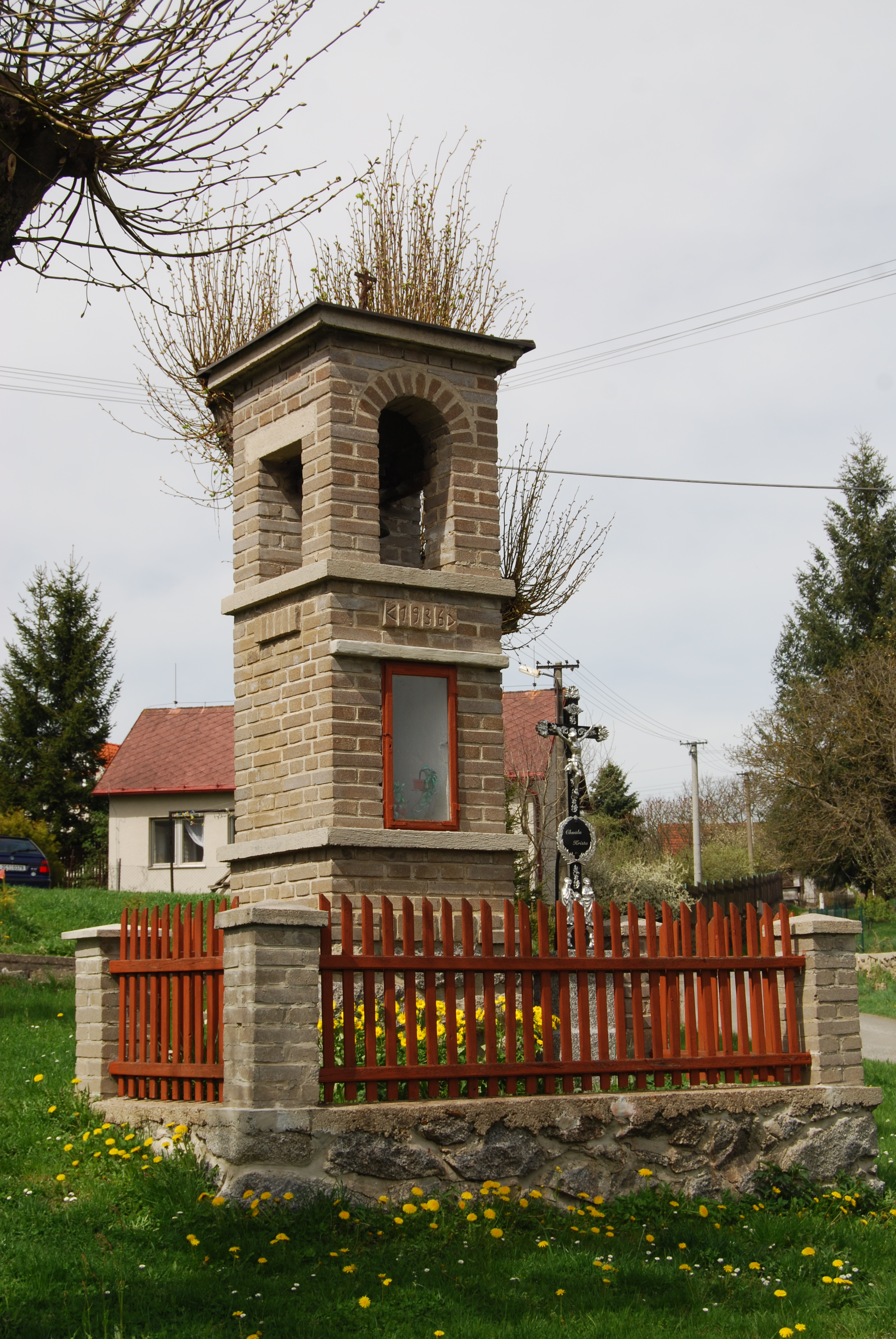 Zvonice v obci. Kaliště je malá vesnice, část obce Nadějkov v okrese Tábor. Česká republika.